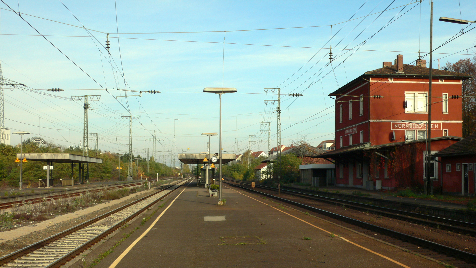 Bahnhof Nürnberg-Stein, Blick von Bahnsteig zwei (Gleise 2 und 3) auf Bahnsteig drei (Gleise 5 und 6, links) und das Empfangsgebäude (rechts)